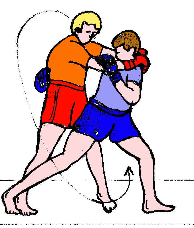 Projection par hanché et barrage